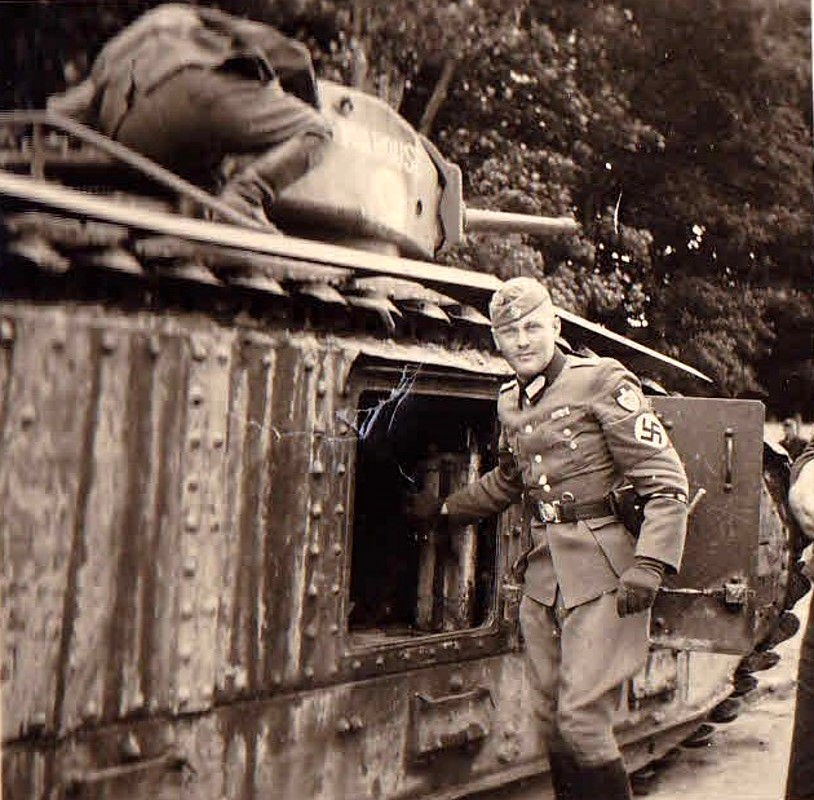 Deutsche Truppen und Panzer vom Typ Char B1 bzw. Char B1 bis im Jahr 1940, möglicherweise in Frankreich